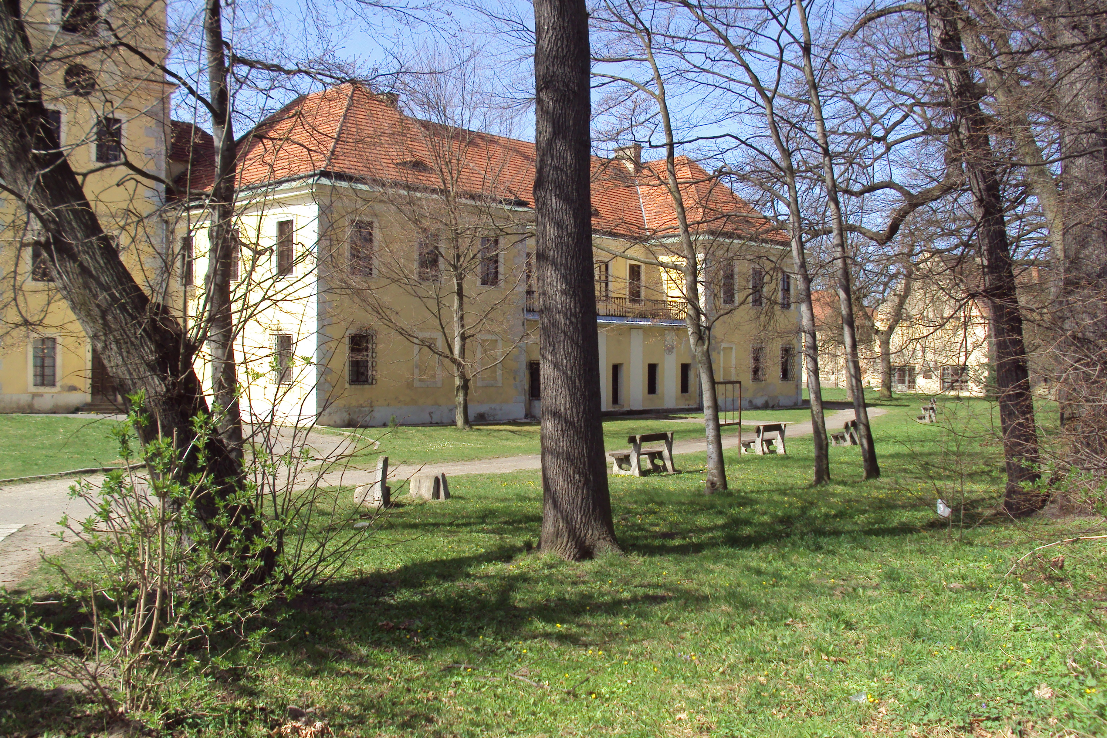 Zámek je ve městě